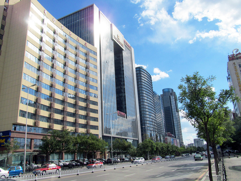 中文（中国大陆）: 沈阳市青年大街